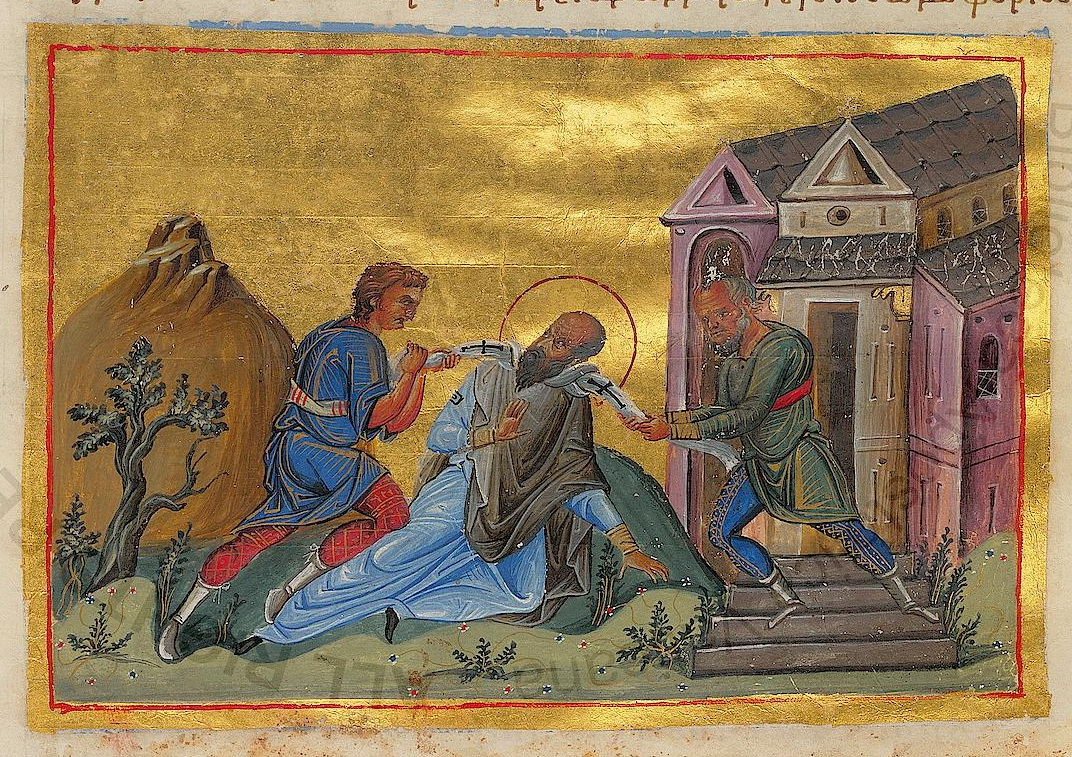 Константинополь. 985 г. Миниатюра Минология Василия II. Ватиканская библиотека. Рим.